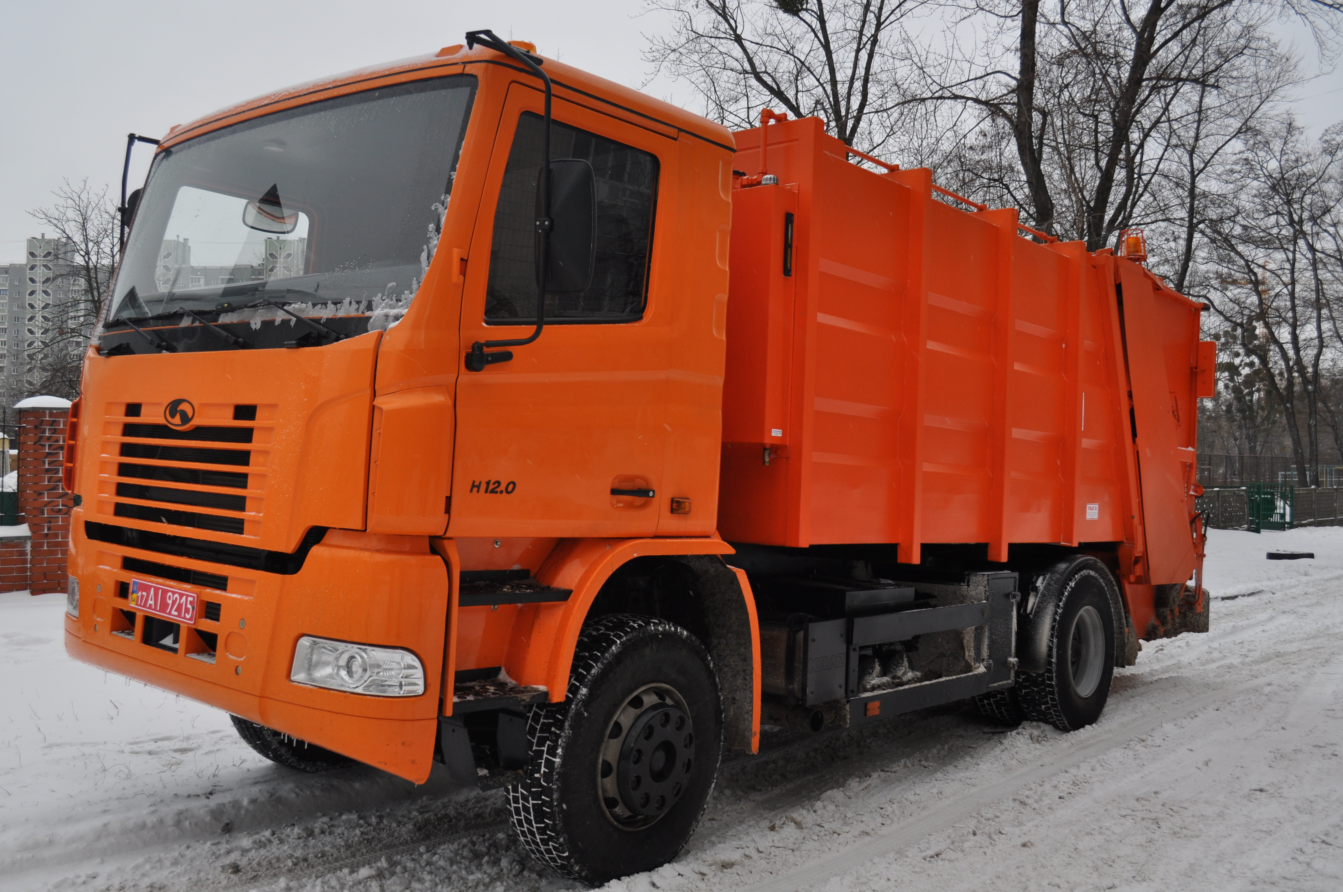 Сміттєвоз